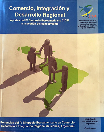 Comercio, Integracion y Desarrollo Regional